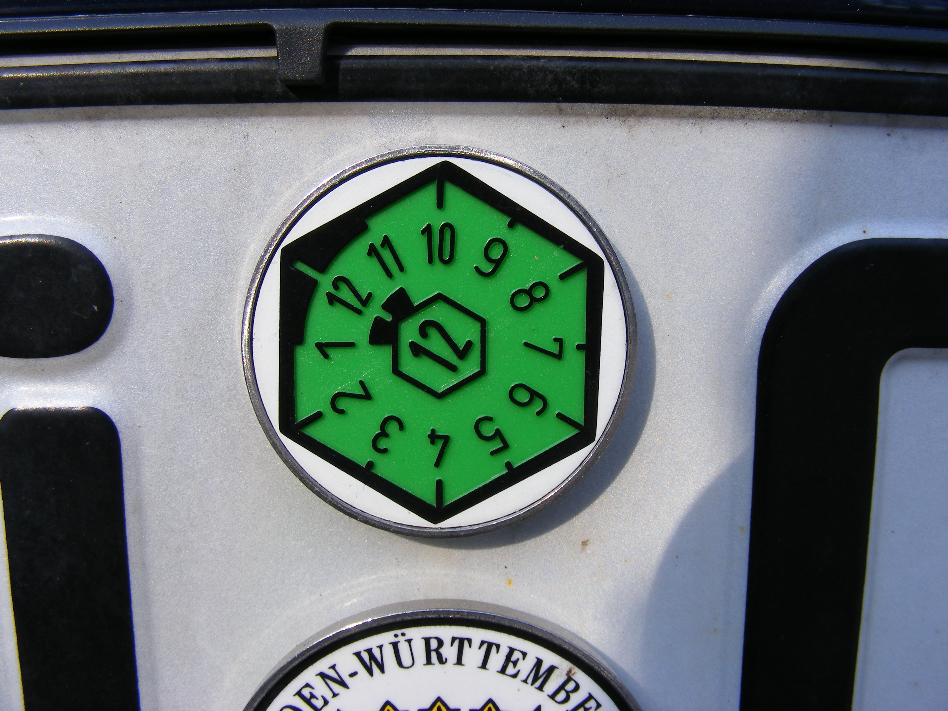 Plakette mit der Angabe der nächsten Frist für die Abgasuntersuchung im Oktober 2012 (die es bereits jetzt schon nicht mehr gibt).